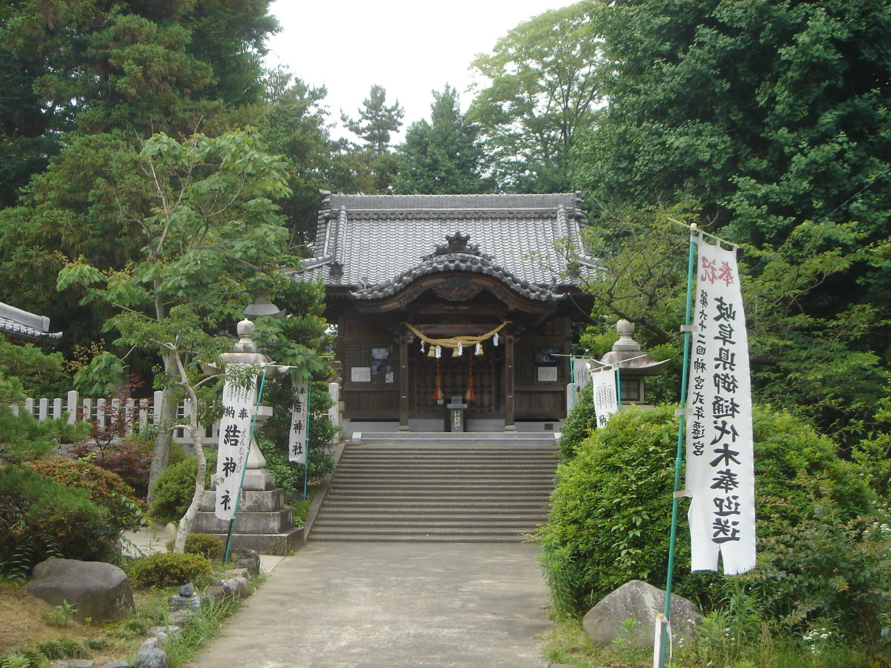 Musubu Jinjya(結神社),Anpachi,Gifu,Japan(岐阜県安八町)で撮影